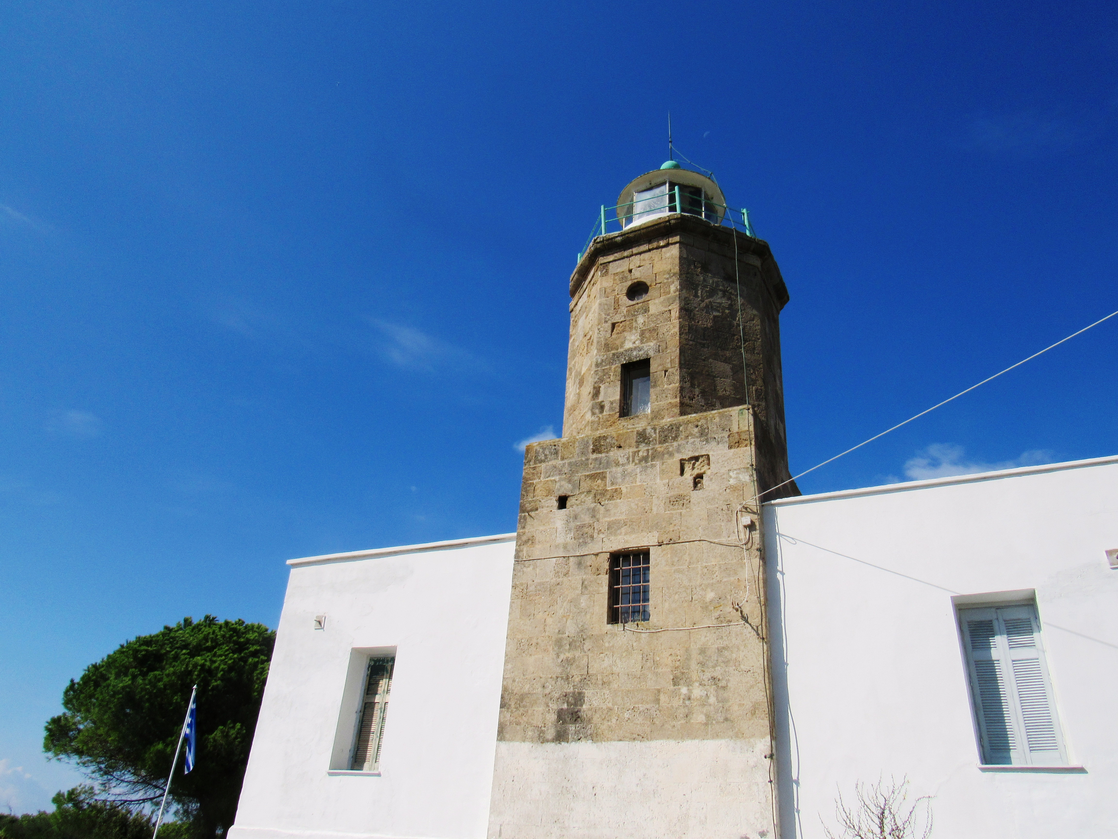 «Φάρος στο Κατάκολο Ηλείας»